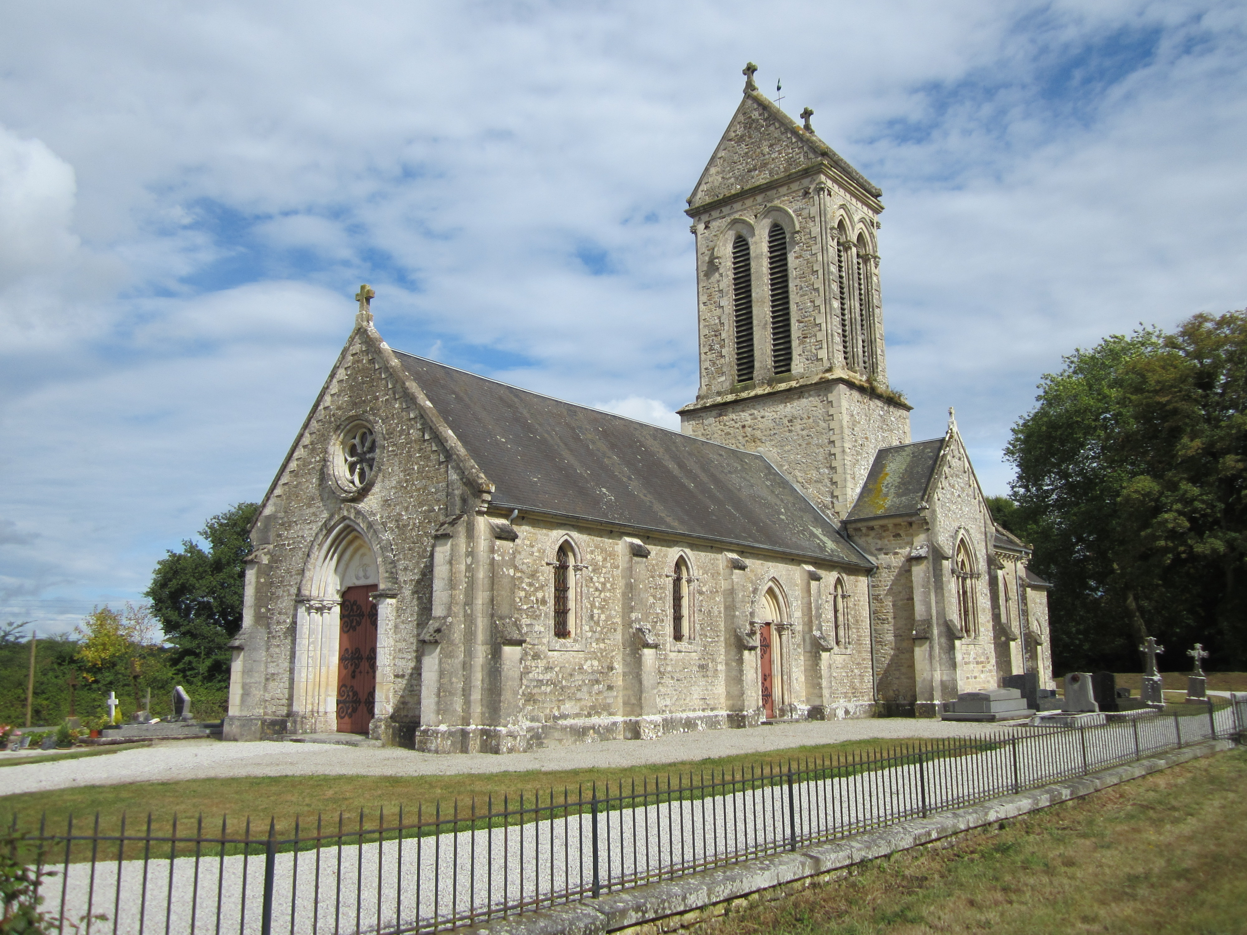 Prétot-Sainte-Suzanne, Manche